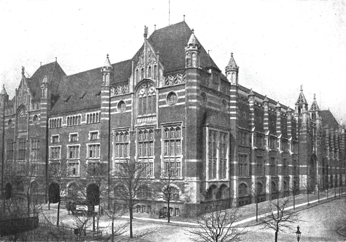 Fernsprechamt Schlüterstraße, Ansicht des Neubaus von der Ecke Binderstraße / Schlüterstraße aus This is a photograph of an architectural monument.